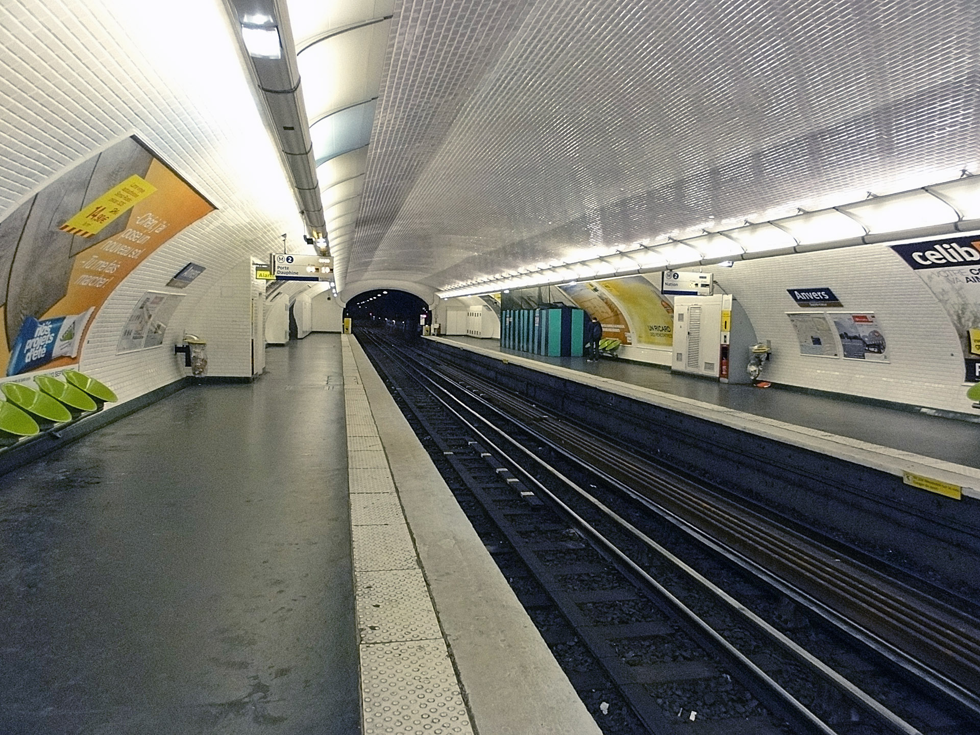 Station Anvers de la ligne 2 du métro de Paris, France.